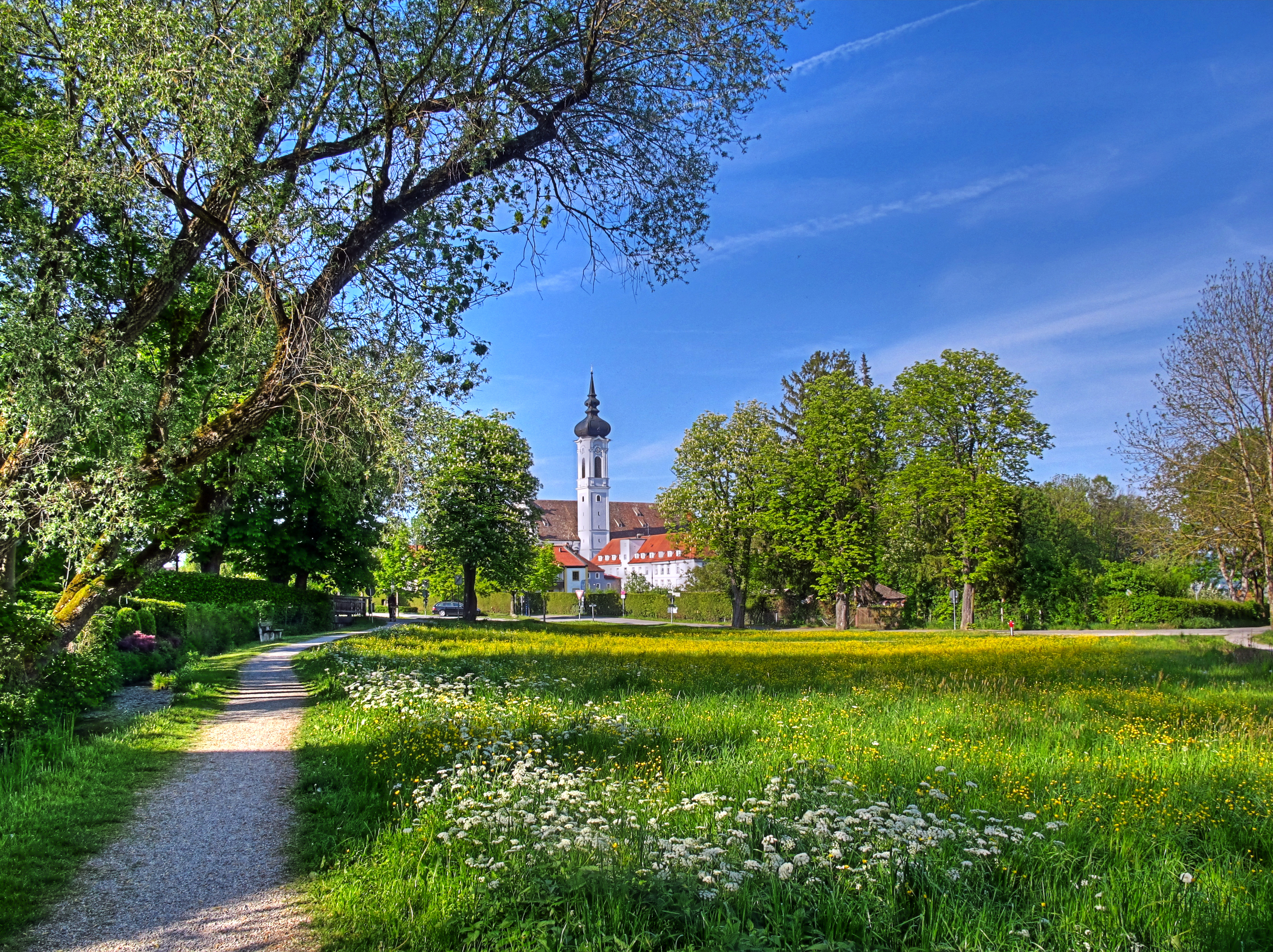 Deutschland, Bayern, Landkreis Landsberg am Lech, Dießen, Marienmünster, König-Ludwig-Wanderweg